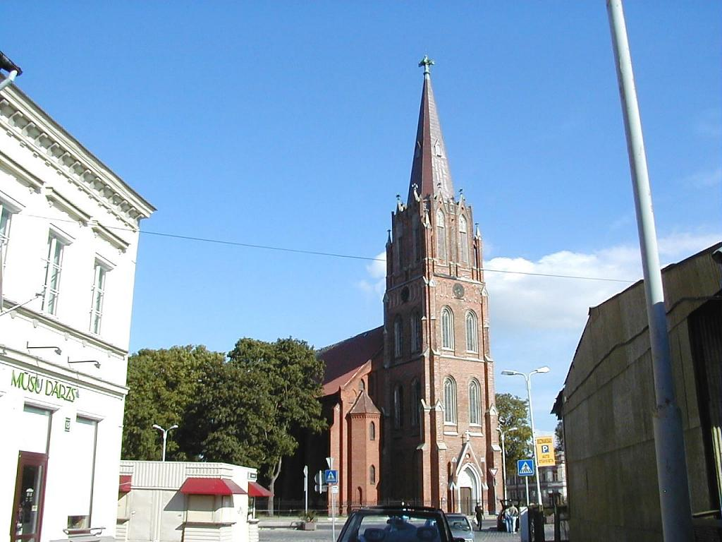 Liepājas Sv. Annas luterāņu baznīca 2002-08-03